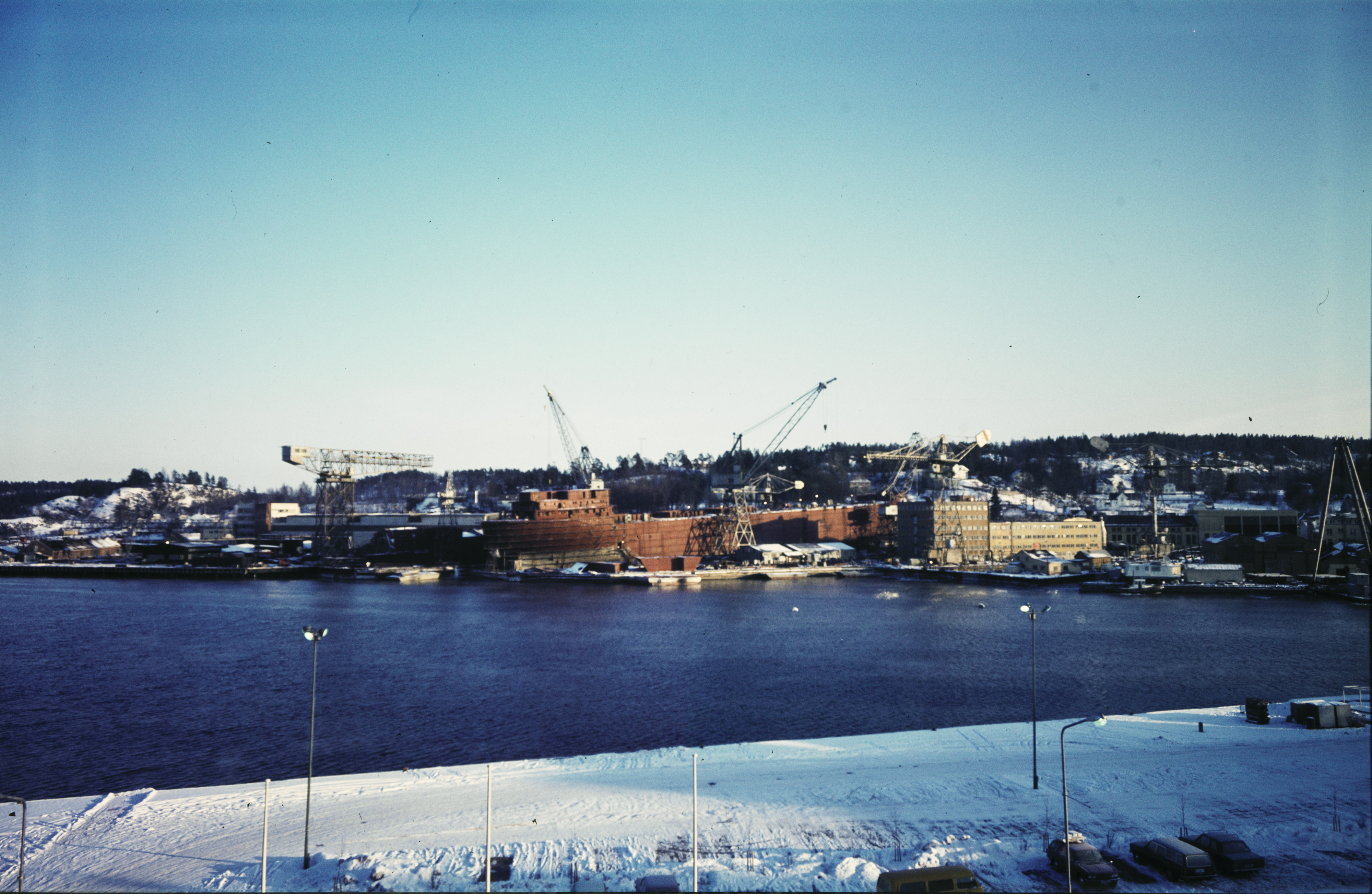 Skipsbygging ved Kaldnes Mekaniske Verksted, Tønsberg